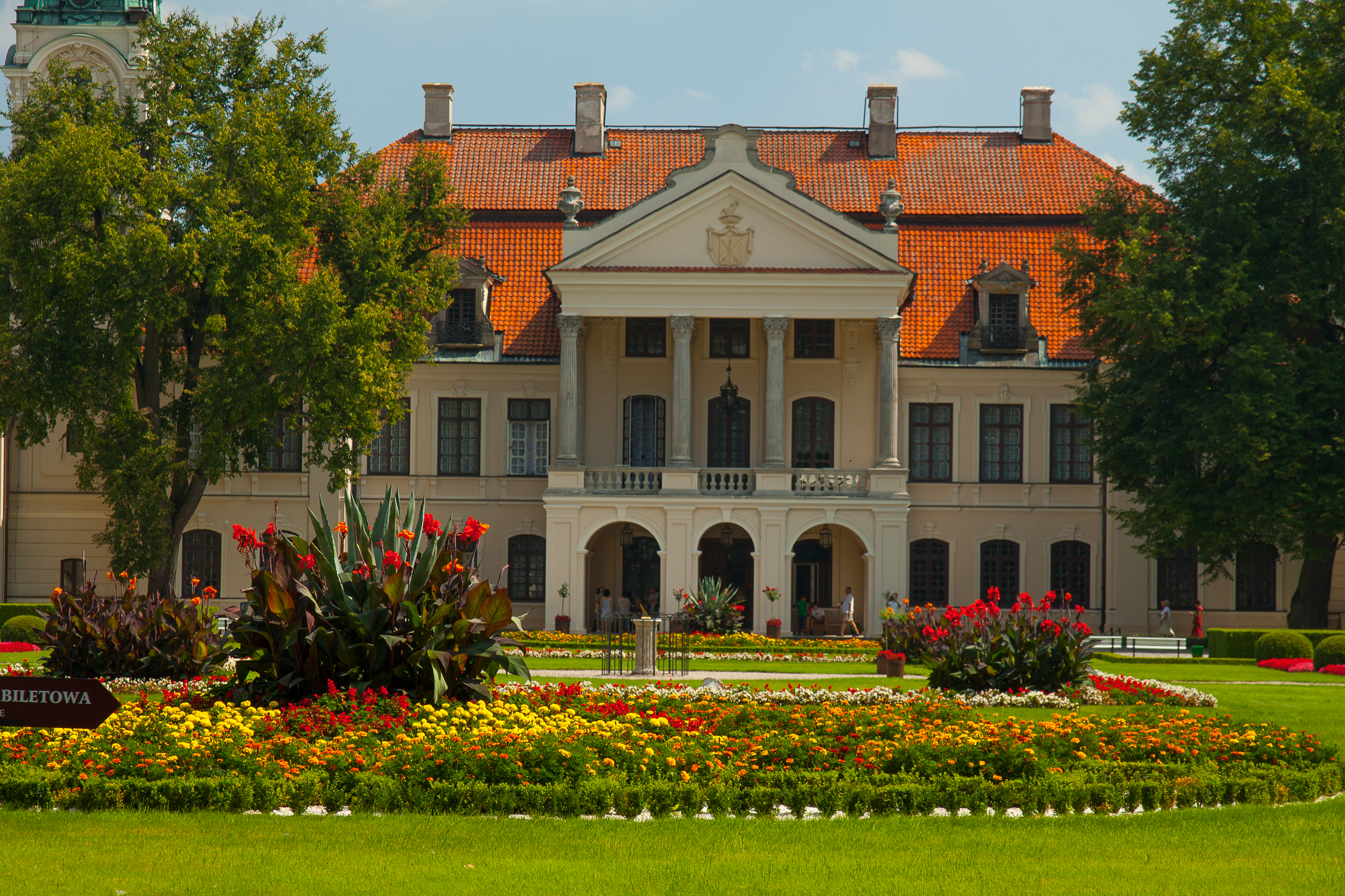 Kozłówka, pałac